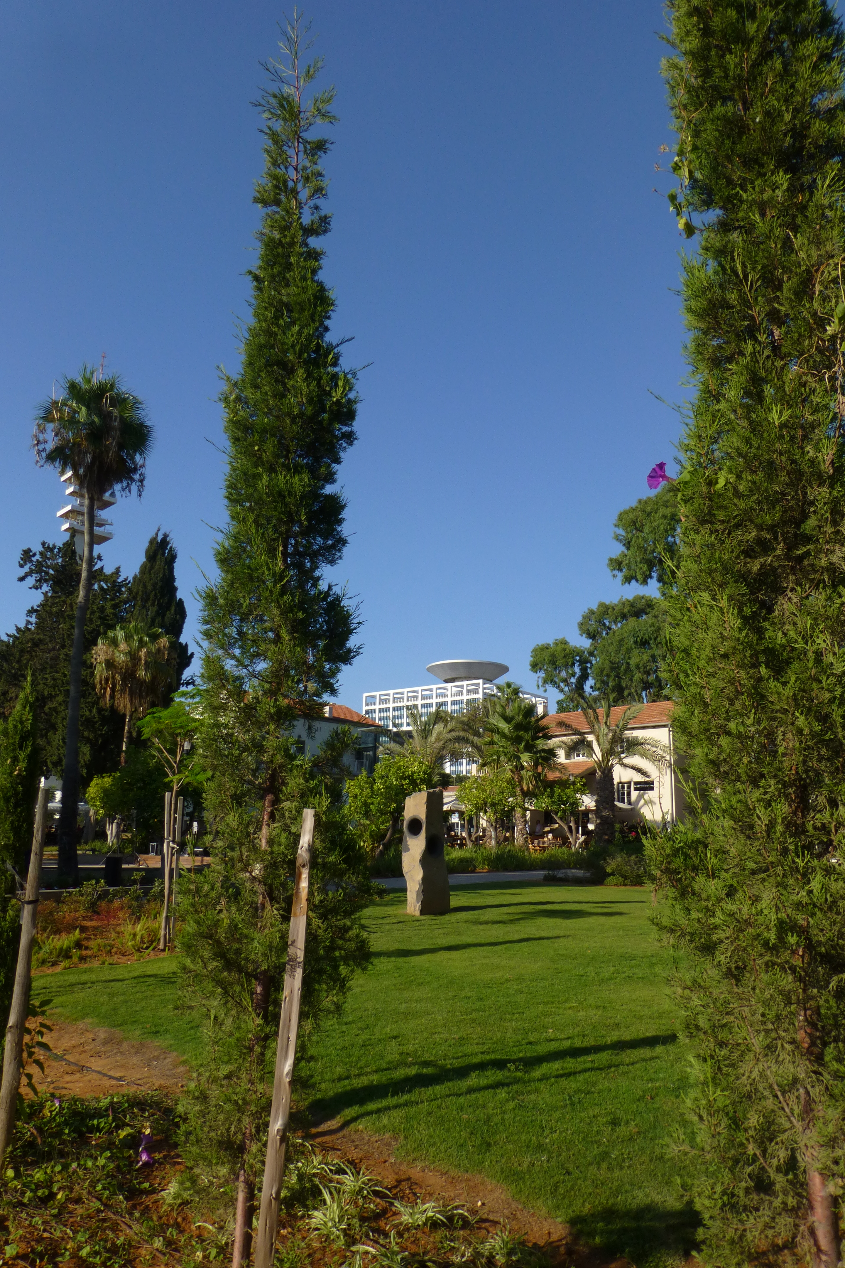 שׂרונה היא המושבה הרביעית שהקימו הגרמנים הטמפלרים בארץ ישראל במחצית השנייה של המאה ה-19. המושבה הוקמה ארבעה קילומטרים צפונית ליפו, ואחרוני בתיה שוכנים כיום בתל אביב בין שדרות שאול המלך מצפון, דרך בגין במזרח, רחוב הארבעה מדרום, ומגרשי החנייה של אחוזות החוף ממערב. מקצתם נמצאים היום בתוך בסיס הקריה.